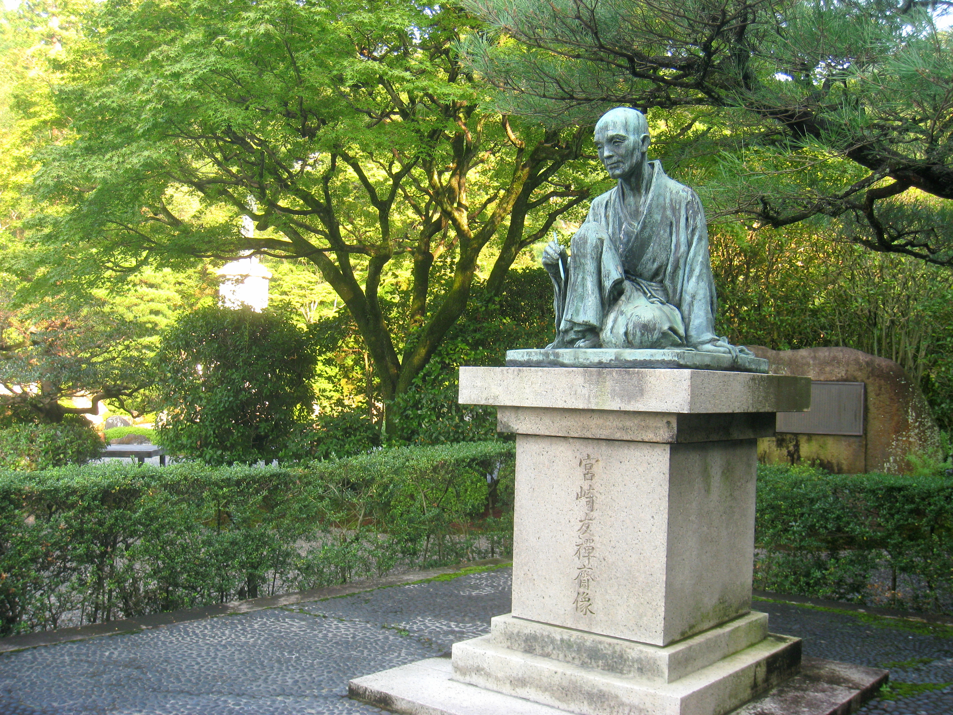 Yuzen-en, Chion-in, Kyoto, Japan.